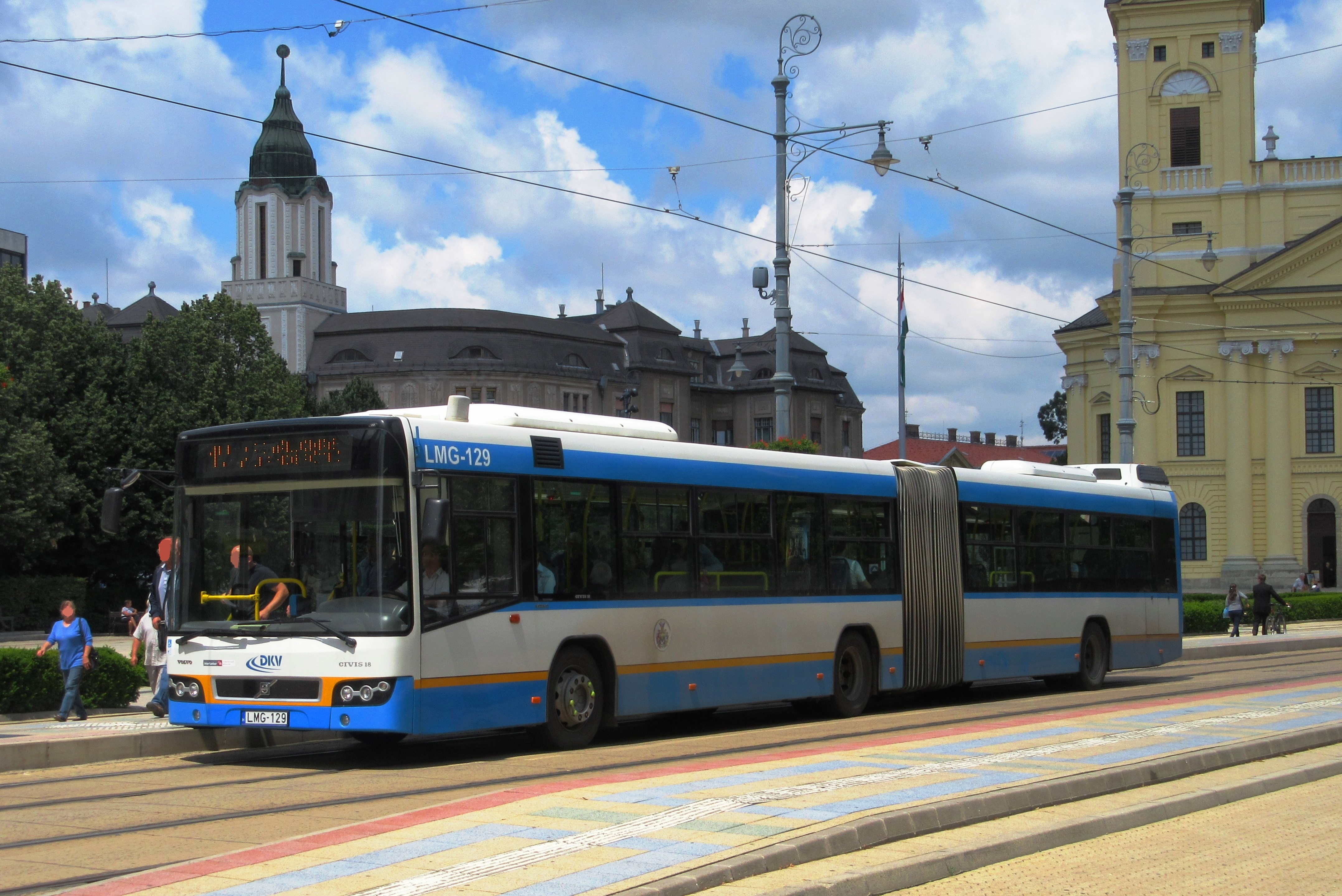 Volvo Cívis 18 csuklósbusz